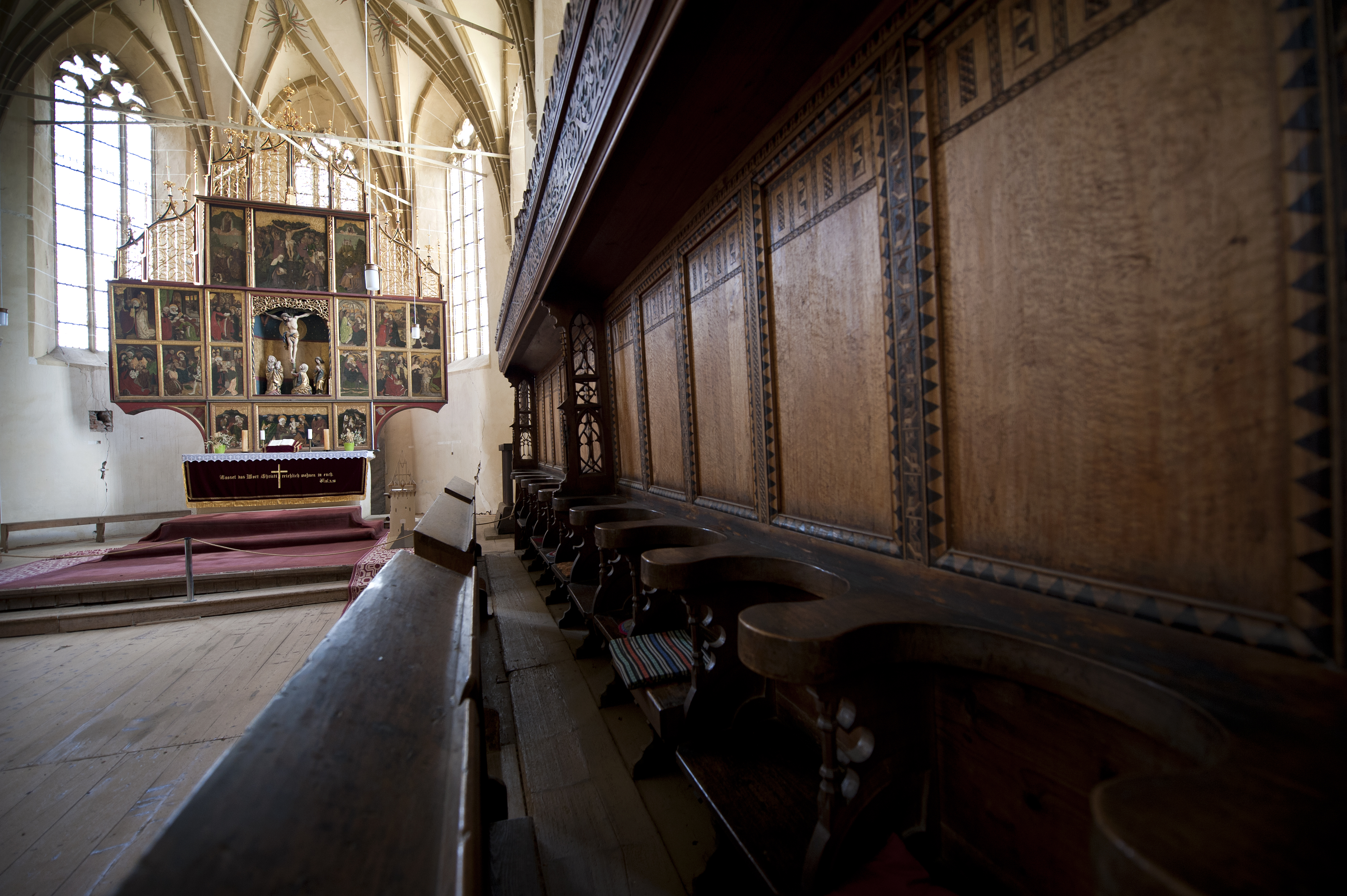 Biserica evanghelică 01